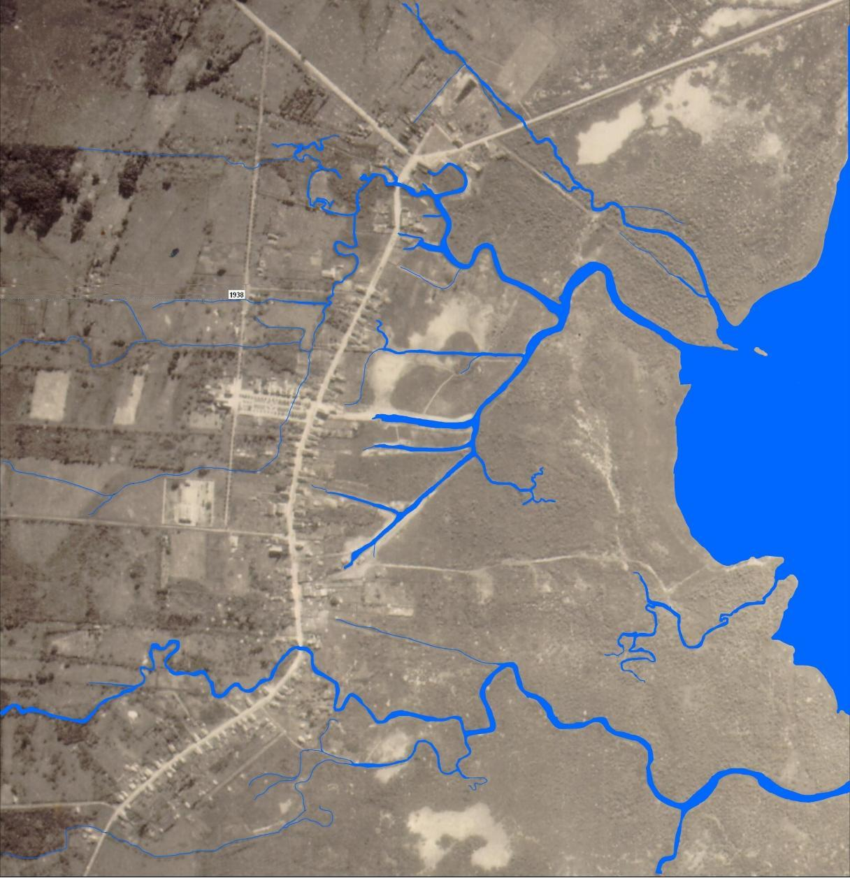 Fotos Centro de Palhoça 1938